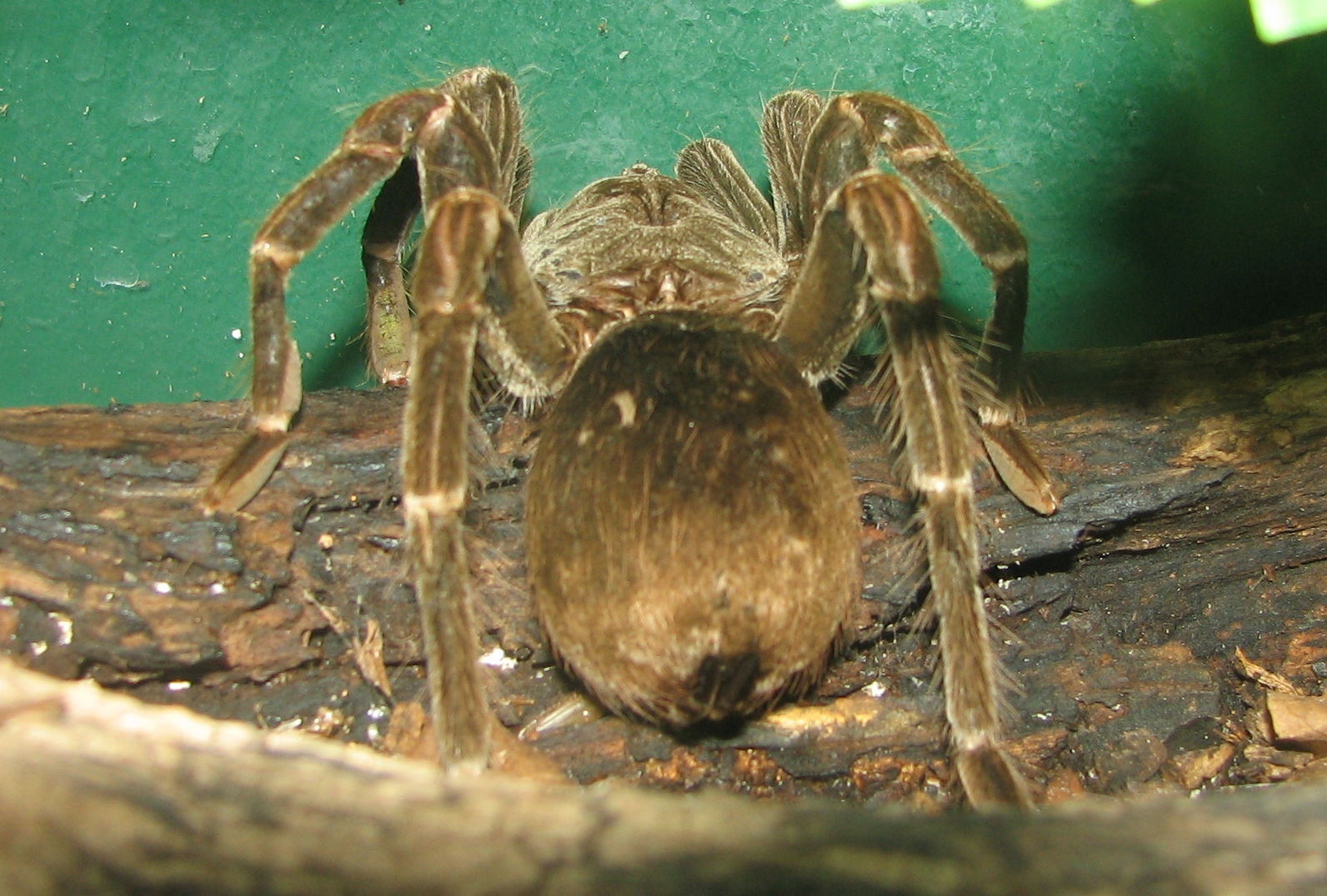 Blue Bloom Bird Eater - Pamphobeteus nigricolor - Louisville Zoo